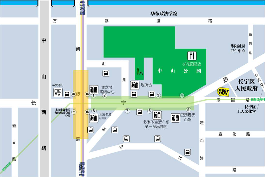 上海轨道交通中山公园站街区图